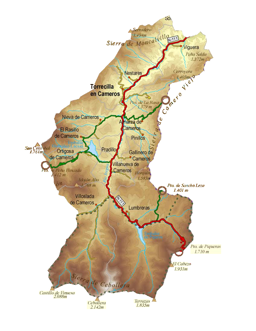 Mapa Físico Comarca Camero Nuevo